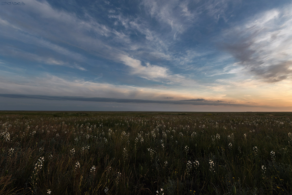 Ростовский заповедник: в центральной части Кума-Манычской впадины, к северу от оз. Маныч-Гудило, в Орловском и Ремонтнеском районах Ростовской области, Орловский район, Ремонтненский район, Ростовская область This image is related to the protected area of Russia number 6100108